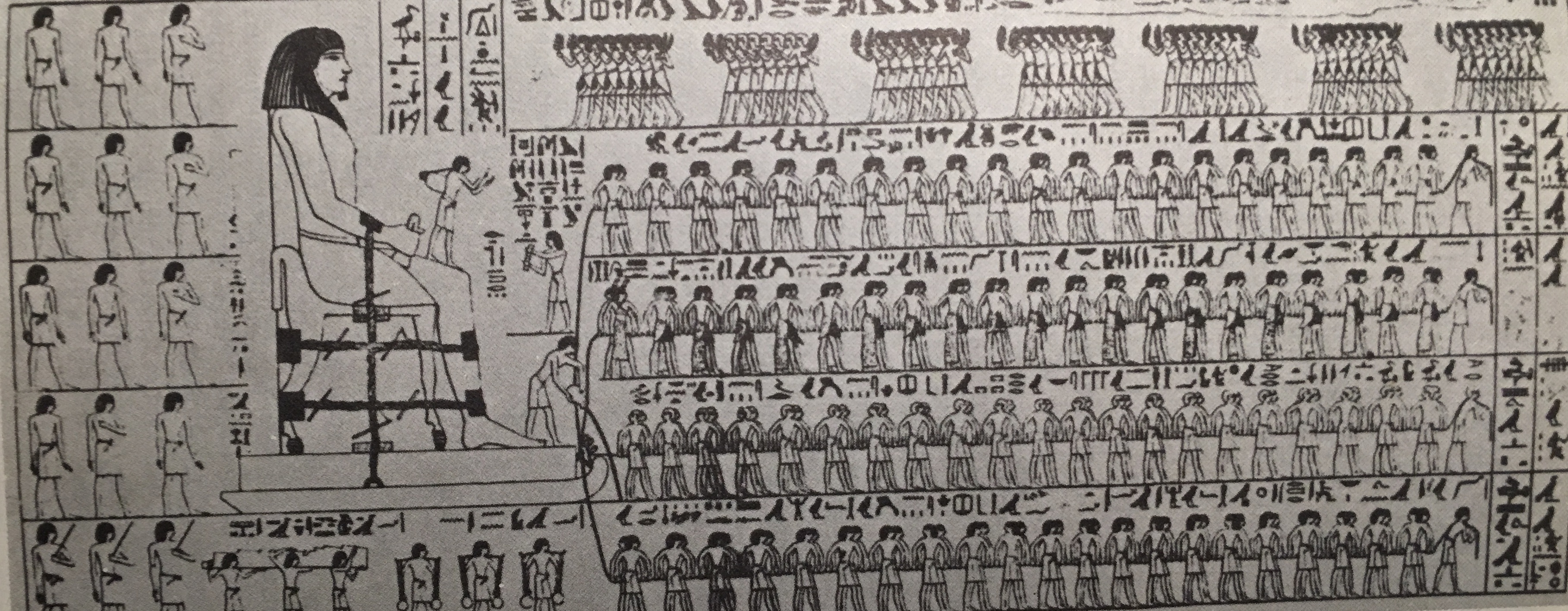 riproduzione del dipinto murario rappresentante il trasporto del colosso di Djehutihotep a el-Bersheh